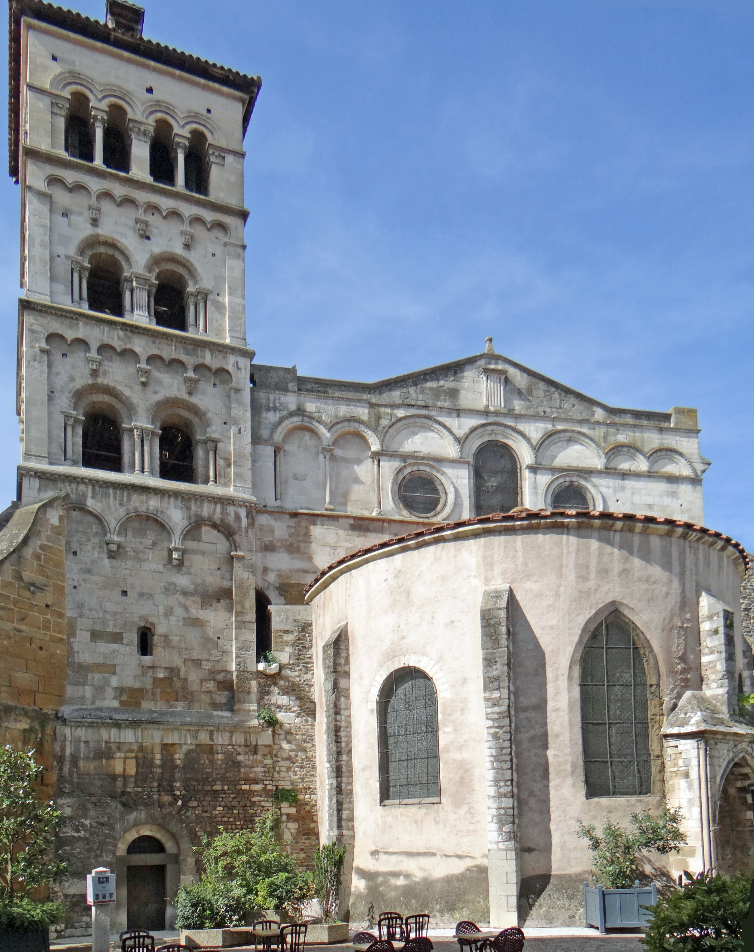 Vienne - Abbaye de Saint-André-le-Bas - Abbatiale : chevet et clocher